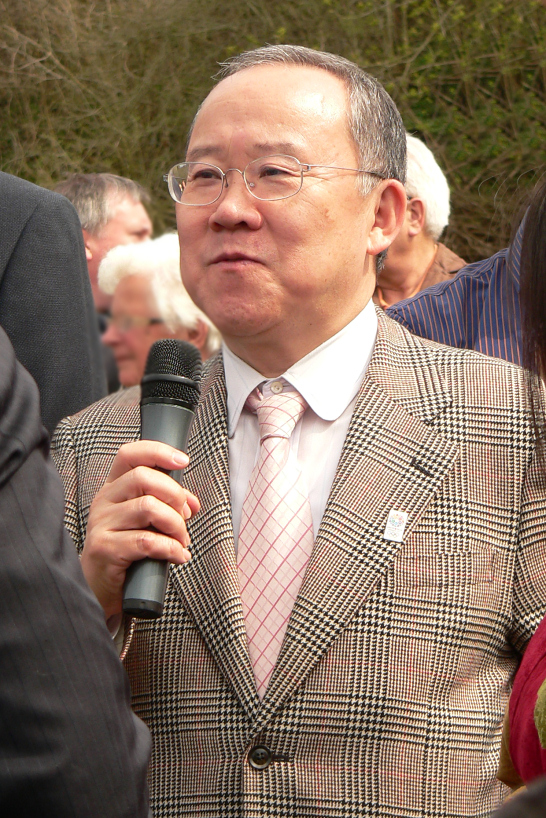 Takeshi Nakane, jap. Botschafter in Berlin beim Kirschblütenfest in Reileifzen